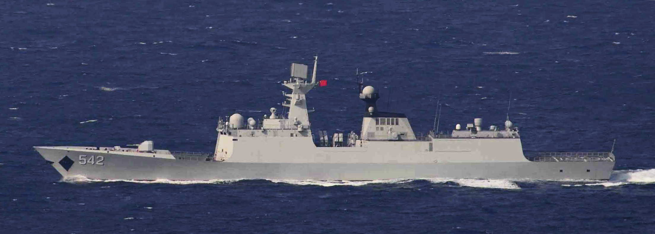 ４月２８日（火）午前９時頃、海上自衛隊第５護衛隊所属「こんごう」（佐世保）、第１２護衛隊所属「うみぎり」（呉）及び第５航空群所属「Ｐ－３Ｃ」（那覇）が、宮古島の南東約８０ｋｍの海域を北西進する中国海軍クズネツォフ級空母「遼寧」１隻、ルーヤンⅢ級ミサイル駆逐艦２隻、ジャンカイⅡ級フリゲート ２隻及びフユ級高速戦闘支援艦１隻の計６隻を確認した。 その後、これらの艦艇が沖縄本島と宮古島の間の海域を北上し、東シナ海へ向けて航行したことを確認した。 なお、これらの艦艇は、４月１０日（金）に男女群島（長崎県）南西で確認され、その後、沖縄本島と宮古島の間の海域を南下したものと同一である。